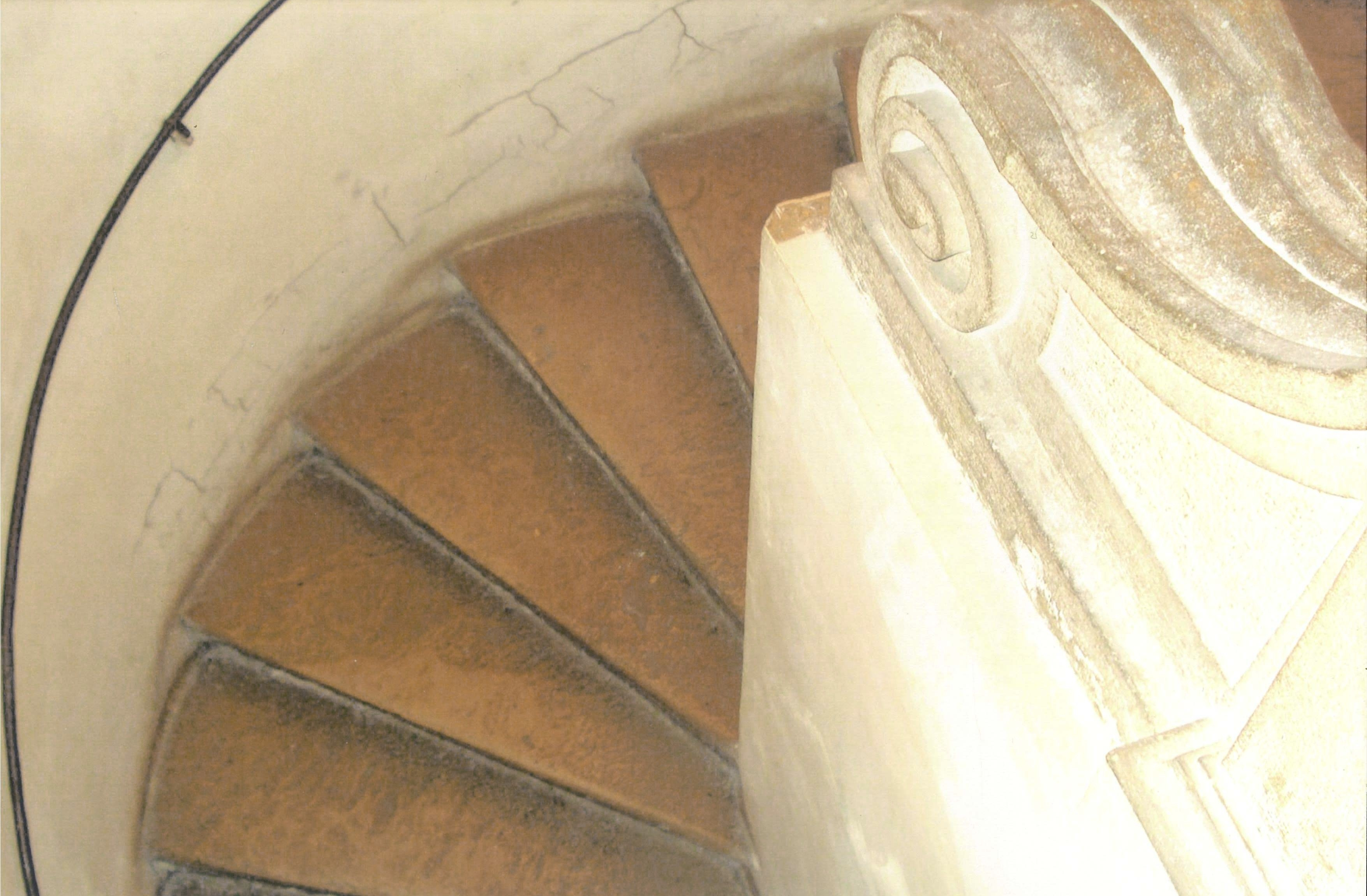 Stephansdom, Stufen zum Oratorium aus hartem Kaiserstein